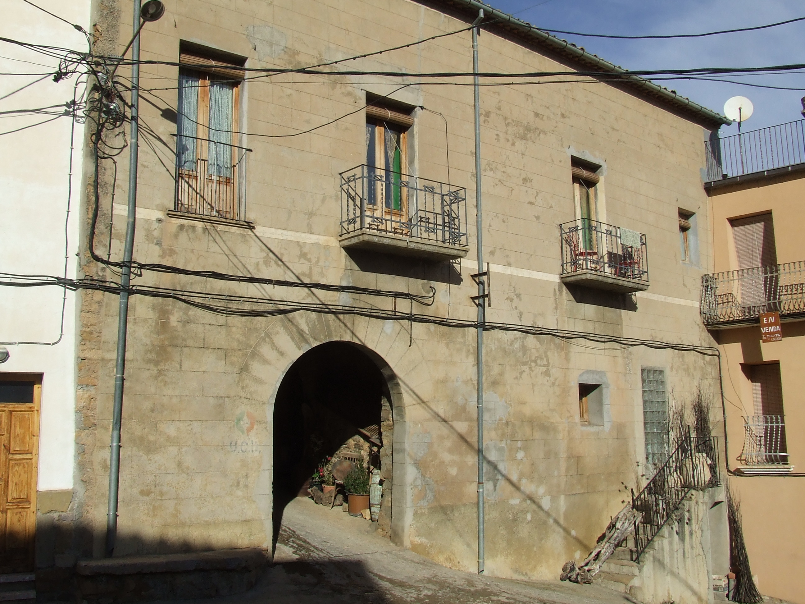 Entrada al clos del poble de Sant Salvador de Toló (Gavet de la Conca, Pallars Jussà)